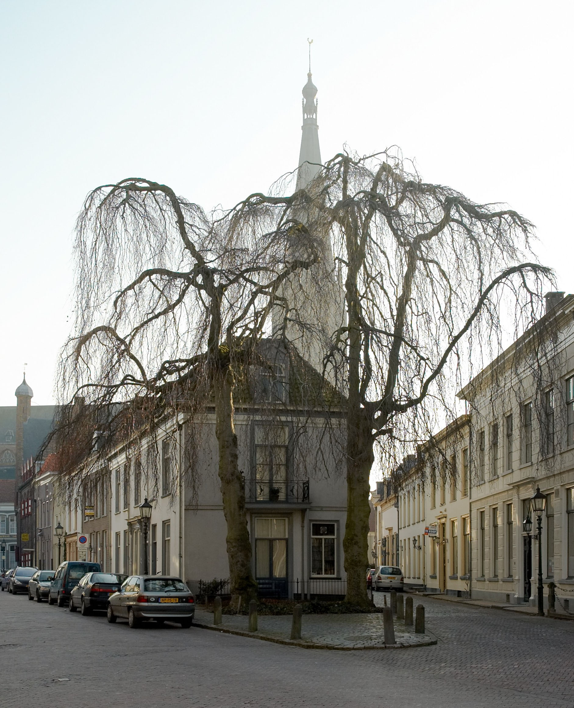 Stadsgezicht in Doesburg kijkend naar het zuiden.